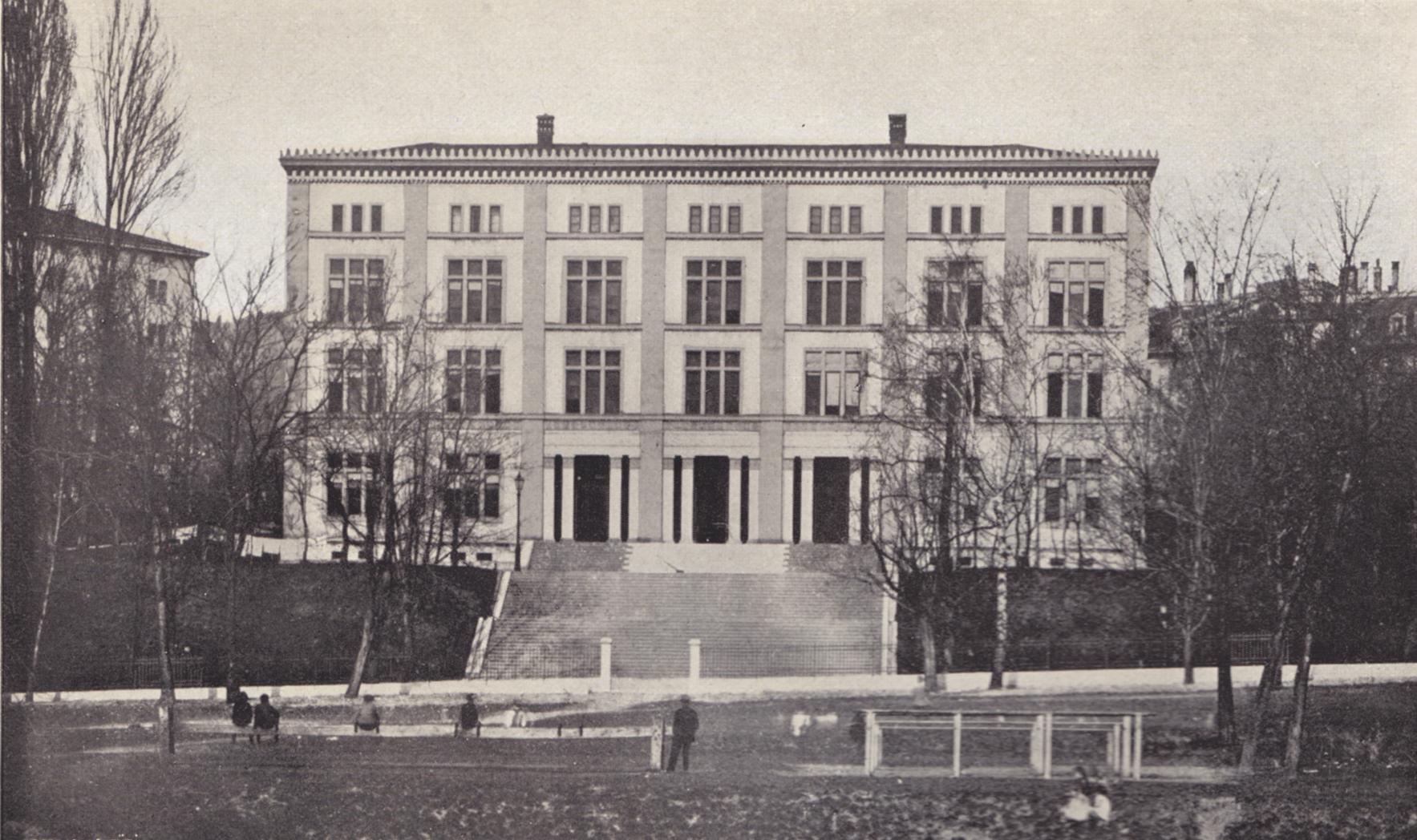 Das Gebäude der Alten Kantonsschule in Zürich. Rämistrasse 59.